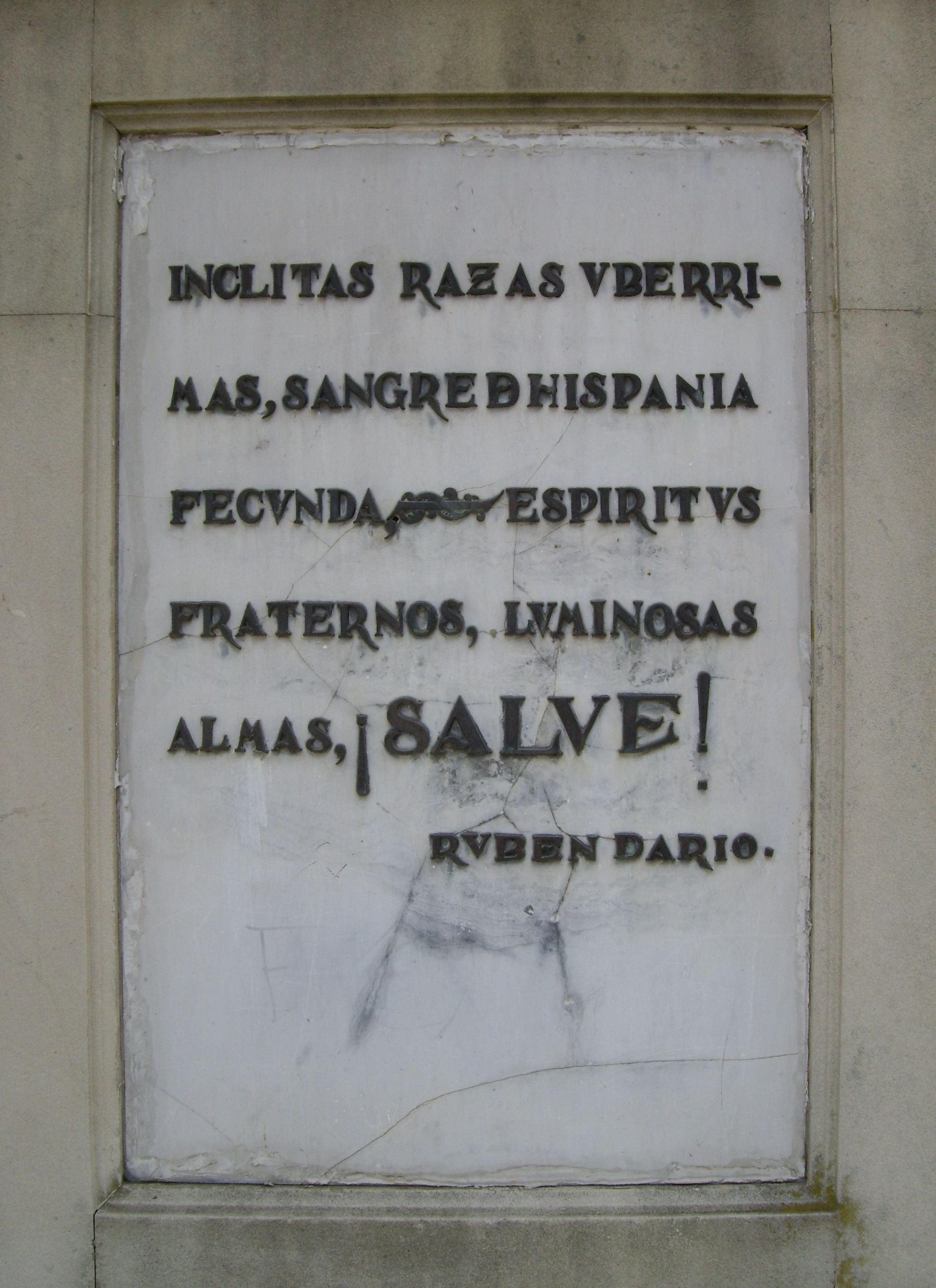 Texto del Monumento a la Raza en Sevilla, de 1929